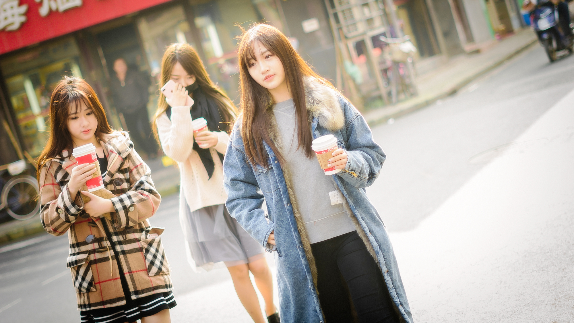 20161207 SNH48 (费沁源, 陈音)